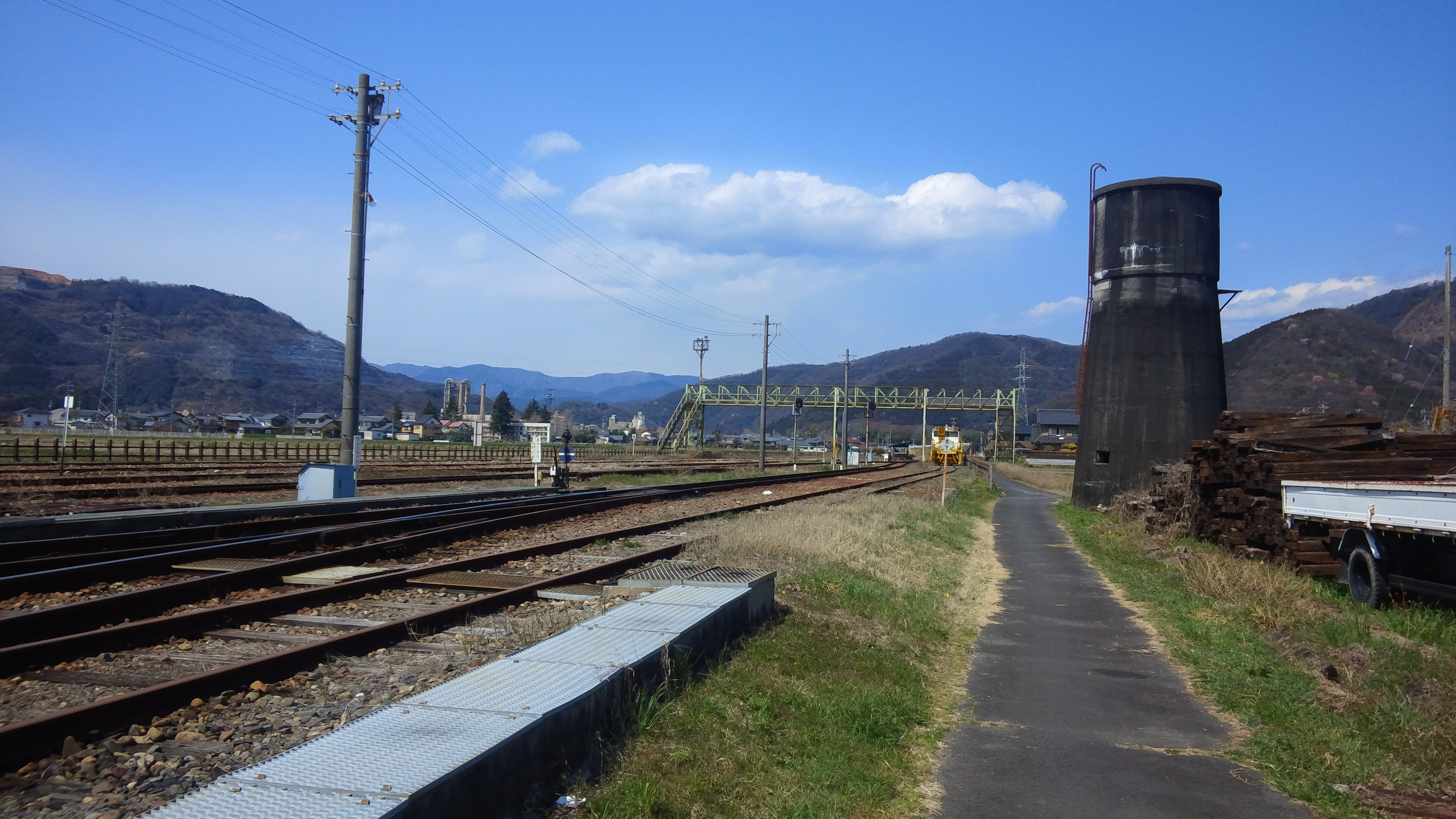 本巣駅構内